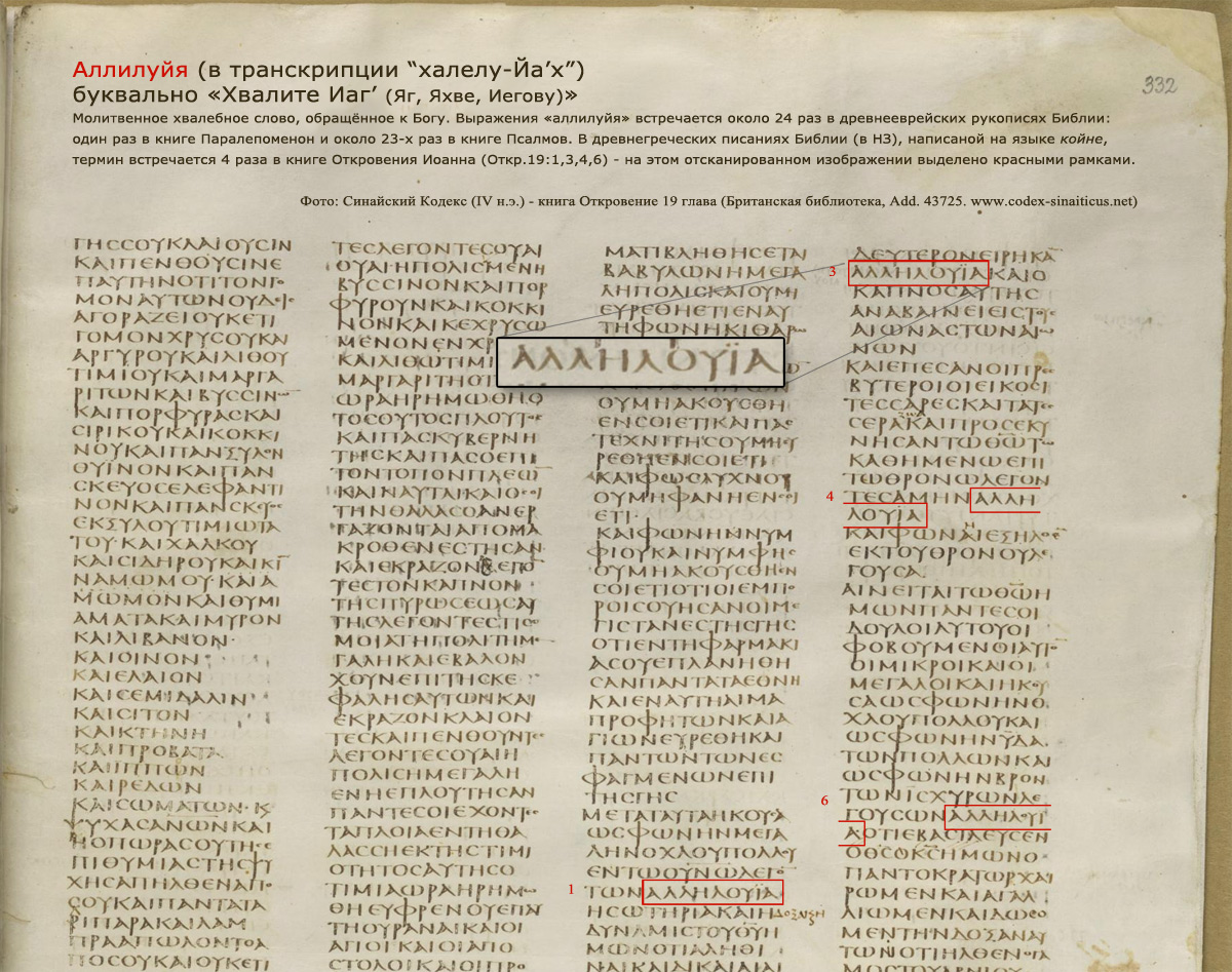 Молитвенное хвалебное слово, обращённое к Богу. Выражения «аллилуйя» встречается около 24 раз в древнееврейских рукописях Библии: один раз в книге Паралепоменон и около 23-х раз в книге Псалмов. В древнегреческих писаниях Библии (в НЗ), написаной на языке койне, термин встречается 4 раза в книге Откровения Иоанна (Откр.19:1,3,4,6) - на этом отсканированном изображении выделено красными рамками. Фото: Синайский Кодекс (IV н.э.) - книга Откровение 19 глава (Британская библиотека, Add. 43725.